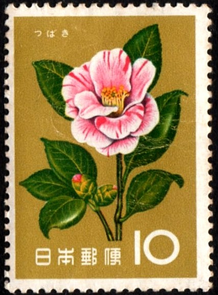 日本の切手、1961 花シリーズ、つばき, Japanese Postage Stamp, 1961 Flower series, Sakura #330, Scott Catalog #714, Camellia japonica blossoms